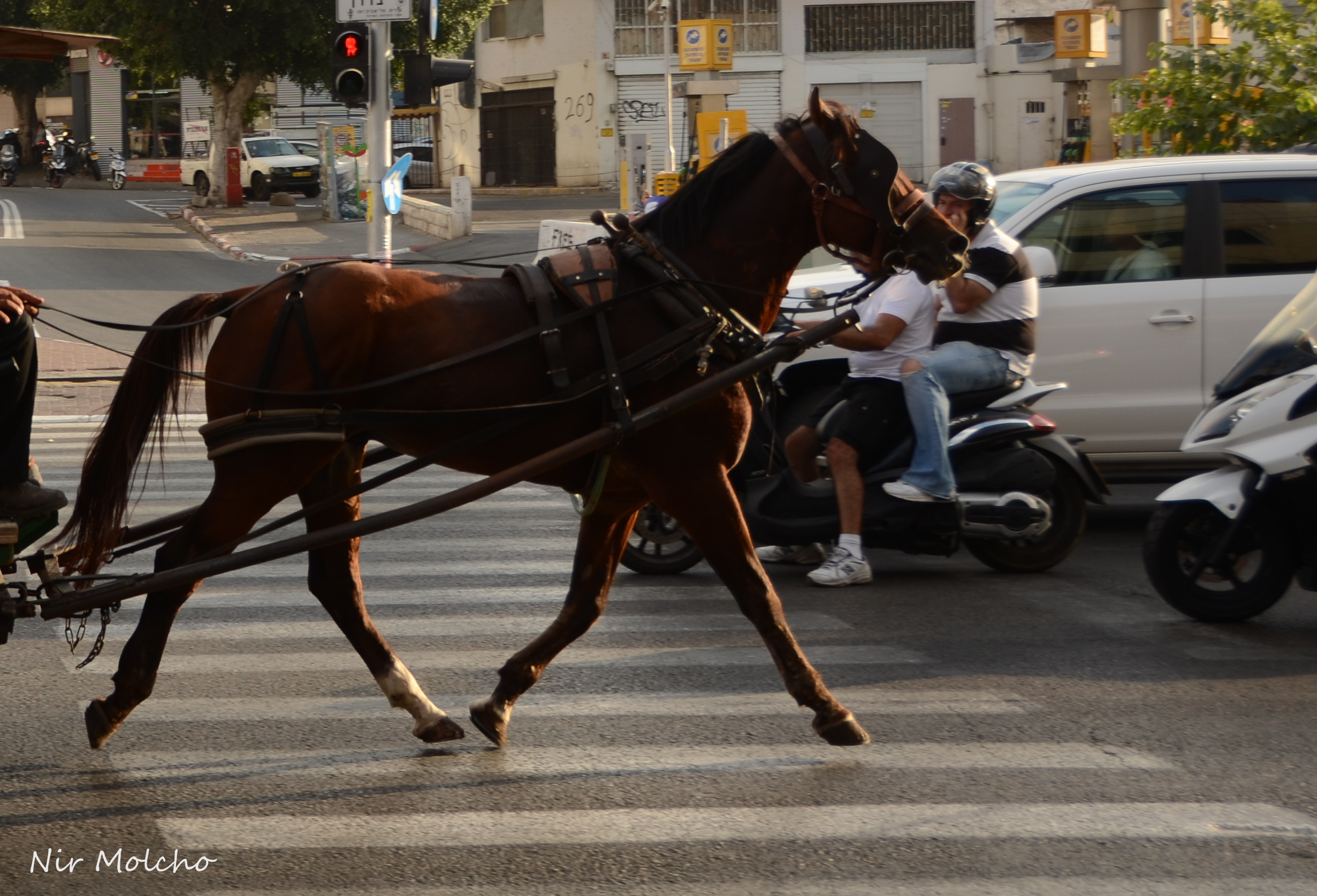 סוס רחוב